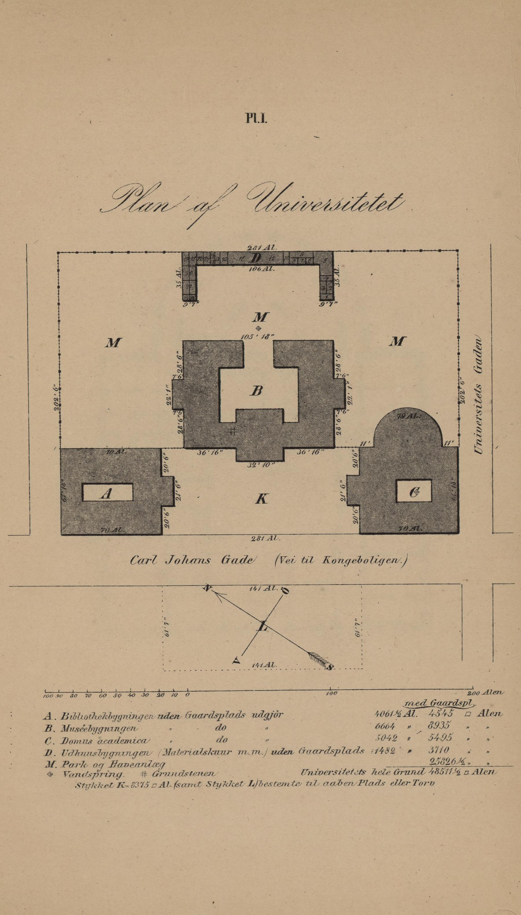 Illustrasjon hentet fra boken "Beskrivelse over de nye Universitets-Bygninger" av Holst, Christian og utgitt av Universitetets Forl. (no, 1852)